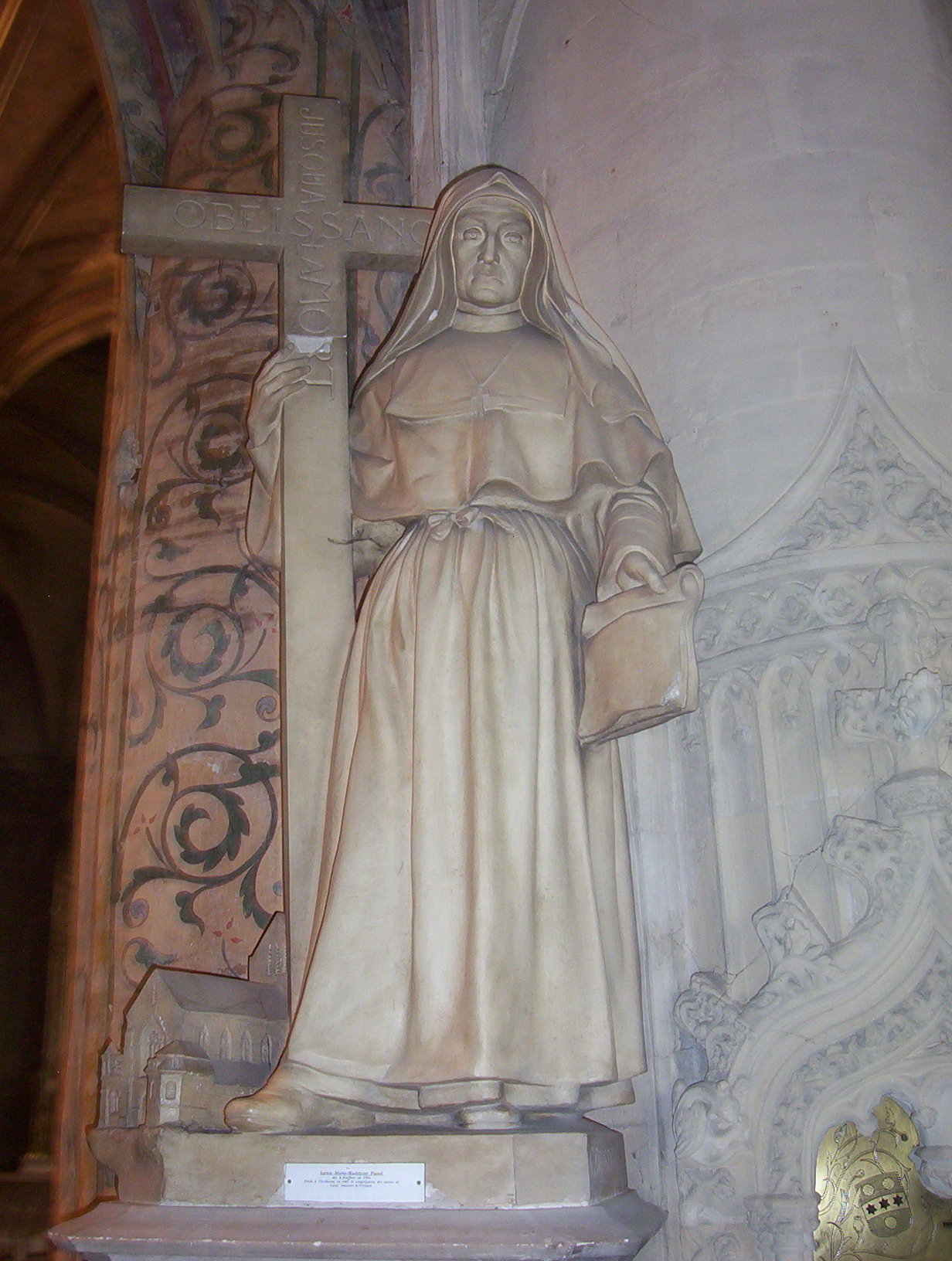 Statue de Sainte Marie-Madeleine-Postel, Basilique de la Trinité, Cherbourg.